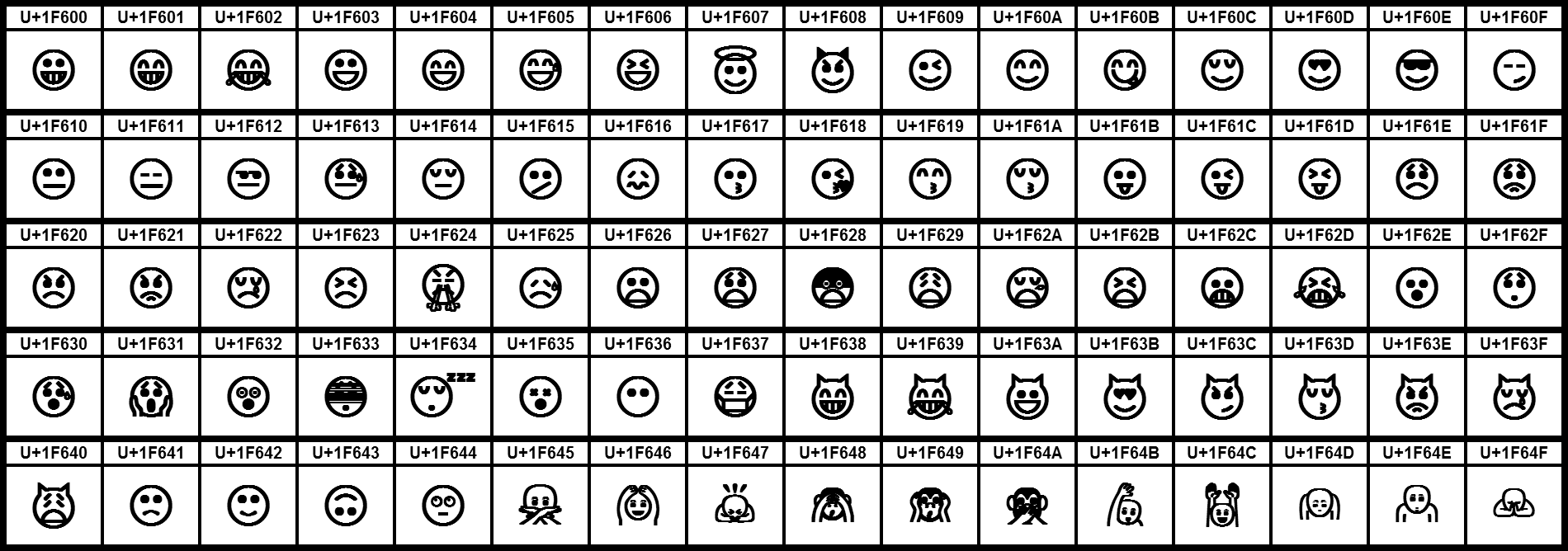 Grafiktafel für den Unicodeblock Smileys. Schraffierte Felder sind unbesetzte Codepoints.